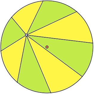 等边切法披萨定理图示